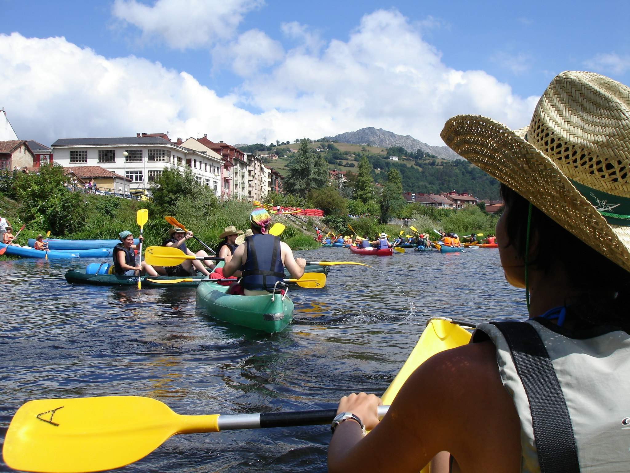 Descenso internacional del Sella 2006